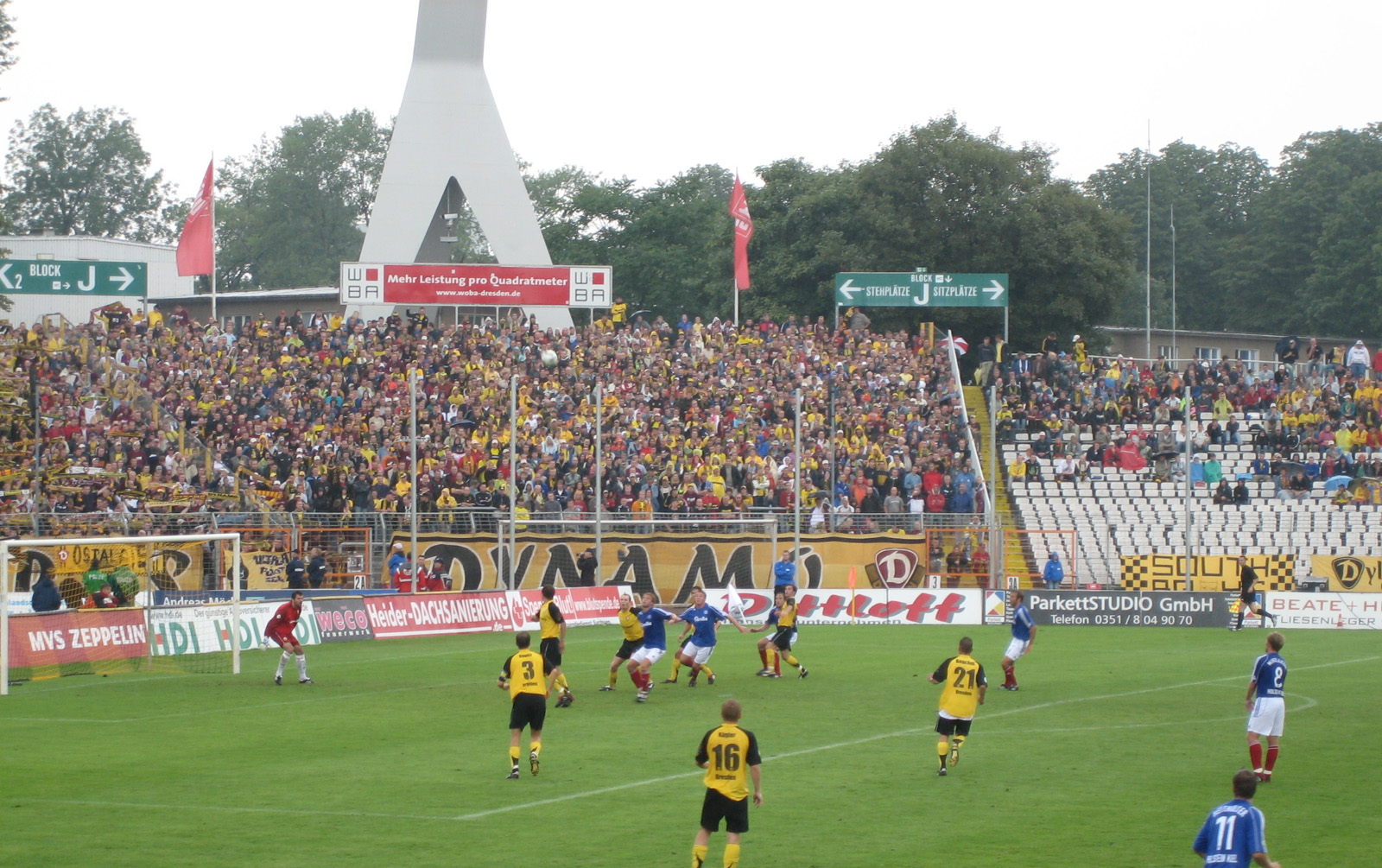 Spiel zwischen Dynamo Dresden (schwarz-gelbe Trikots) und Holstein Kiel (blaue Trikots) am ersten Spieltag der Regionalliga Nord Saison 2006/07 im Rudolf-Harbig-Stadion.